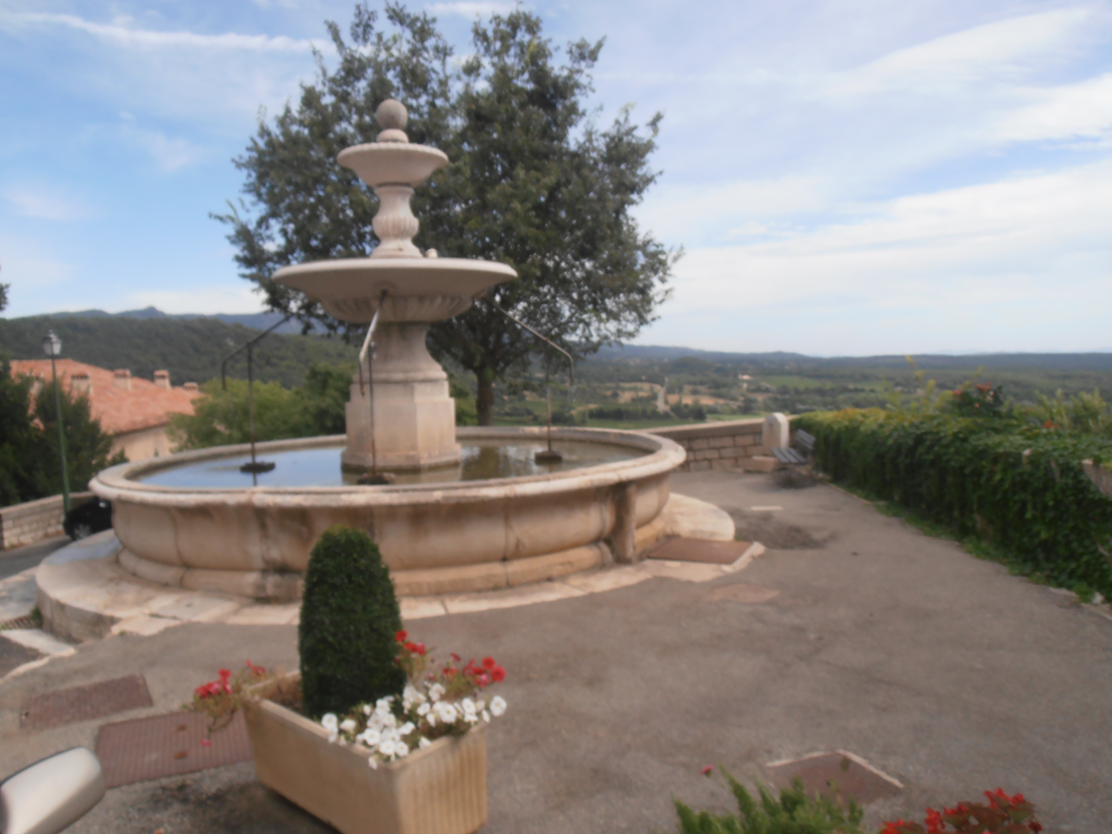 Var, Moissac-Bellevue, Fontaine du village